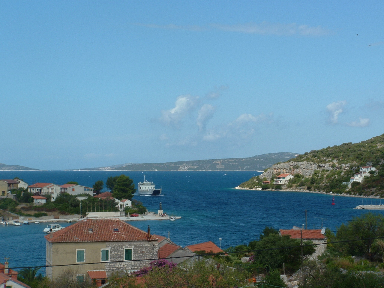 DolazakBroda